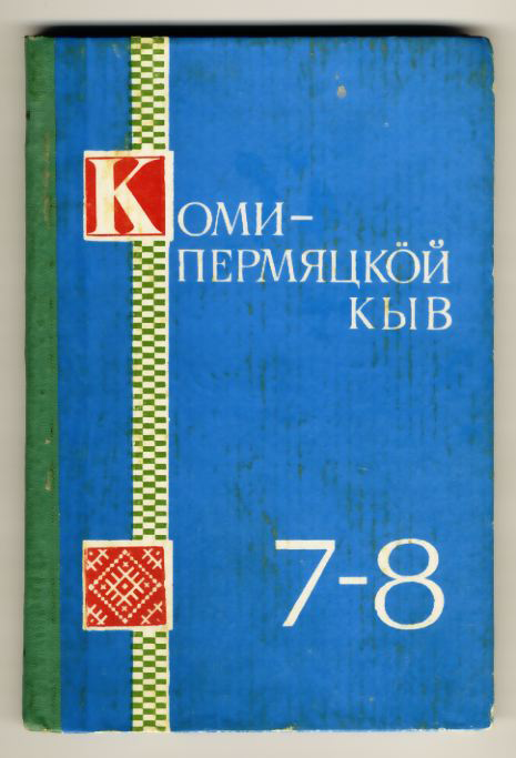 This is a scanned version of the front page of the book А.С. Кривощёкова-Гантман, Е.В. Ботенва, Э.В. Ботева, Э.И. Порсева 1984; Коми-Пермяцкӧй кыв 7-8 классэз понда учебник Пермскӧй книжнӧй издательство, Коми-Пермяцкӧй отделениё. Кудымкар.